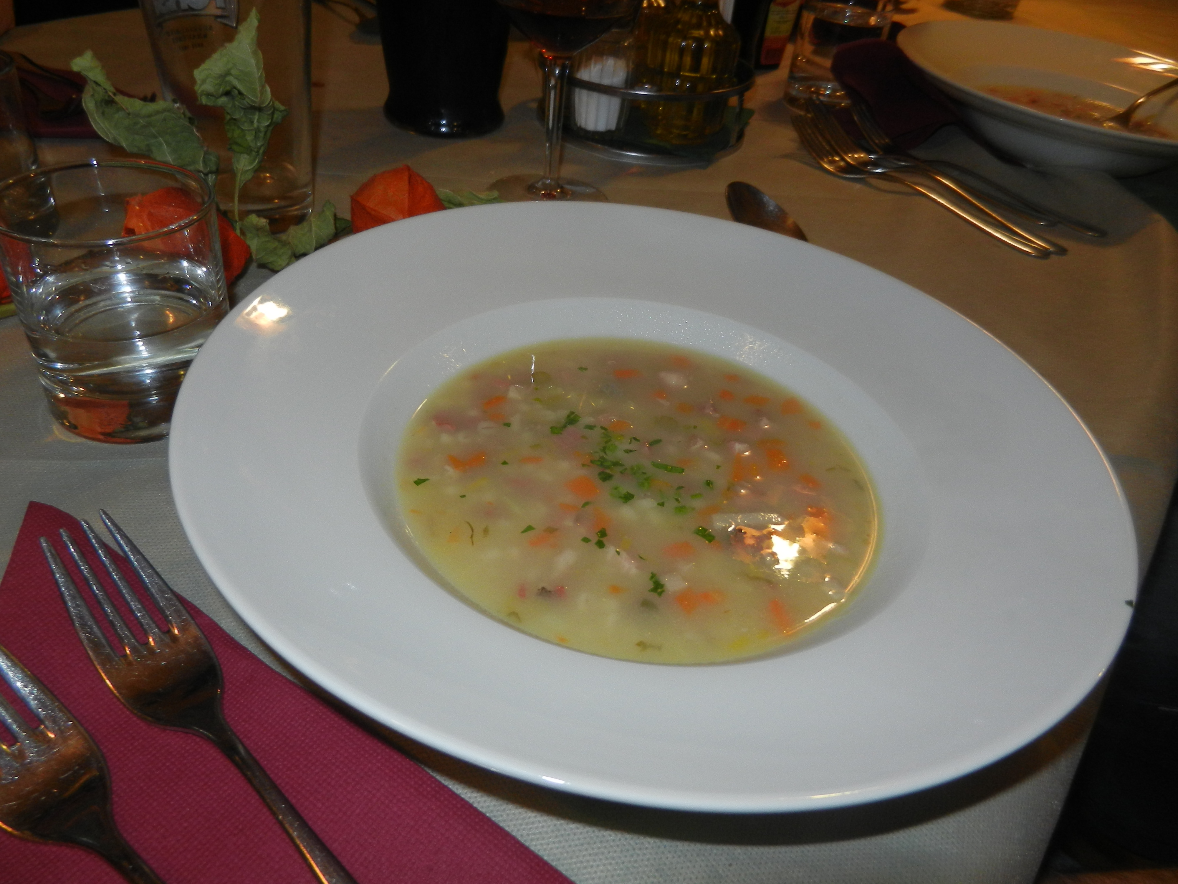 Gerstlsuppe